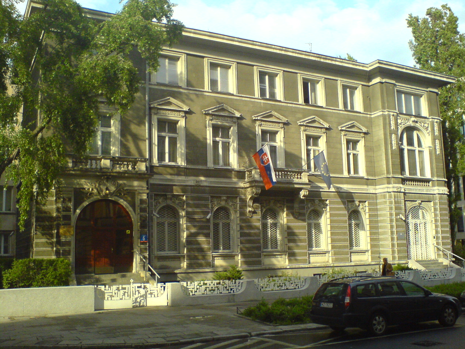 PL, Warszawa, Ambasada Republiki Słowackiej w Polsce, ul. Litewska 6 (budynek)